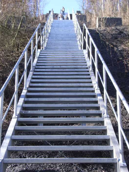 Himmelstreppe der Millicher Halde, Hückelhoven